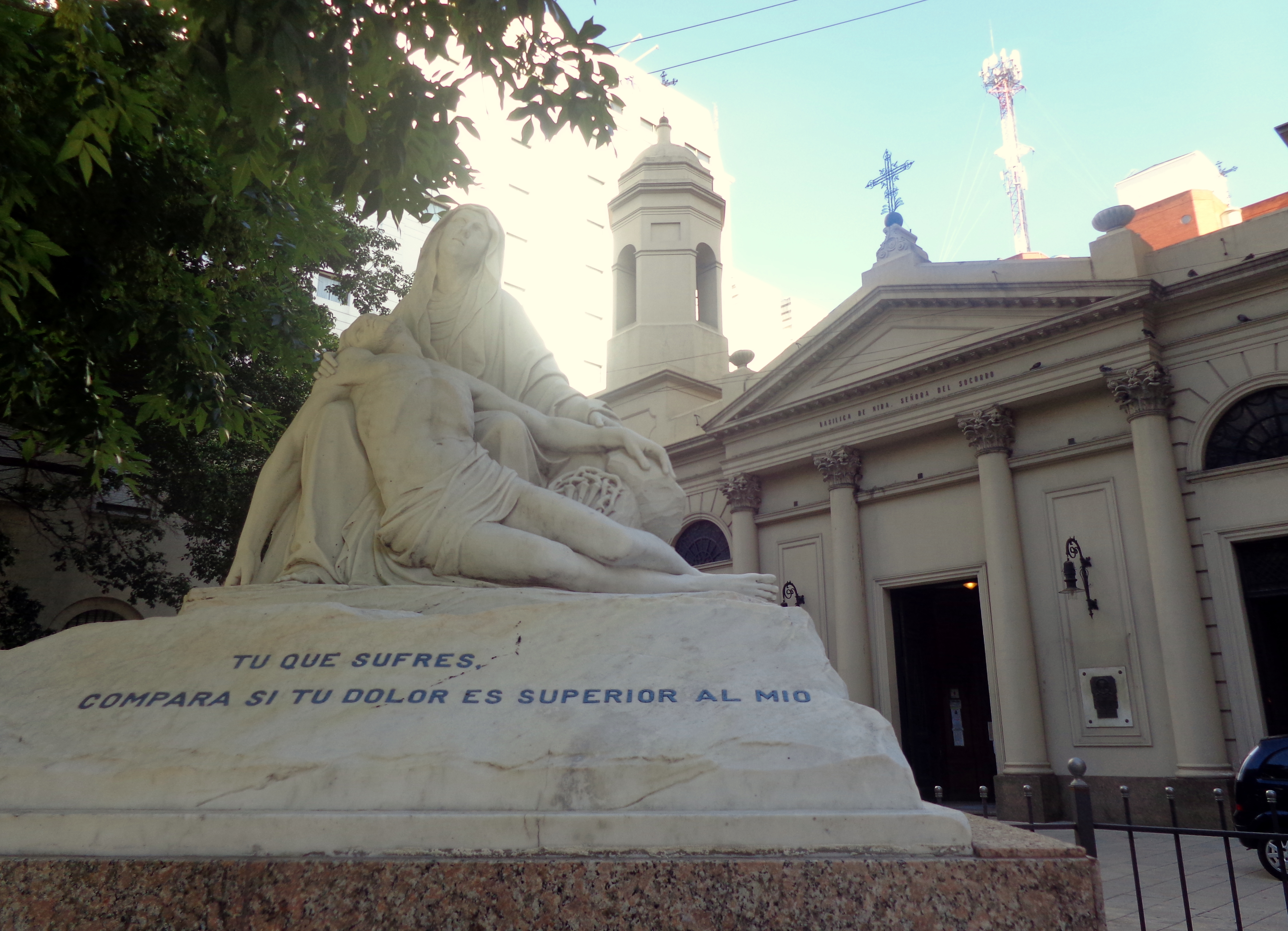 Basílica de Nuestra Señora del Socorro, en Retiro, Buenos Aires, Argentina.